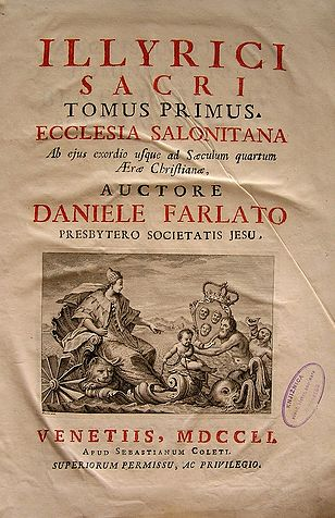 Titulus Illyricum Sacrum, tomus primus de Ecclesiae Salonitanae, auctore Danielo Farlato. Venetiae 1751